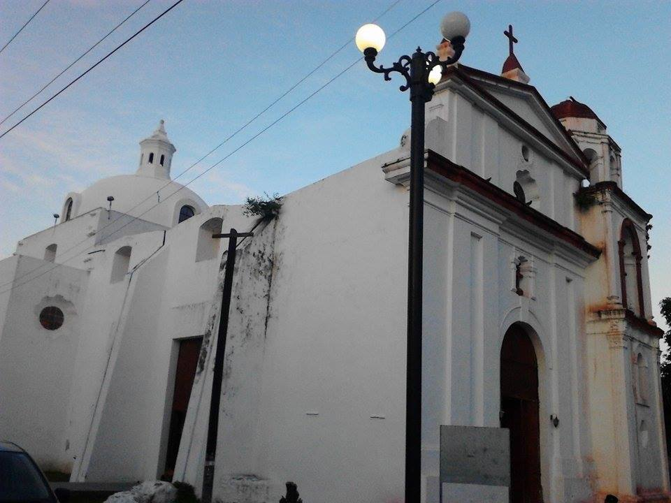 La iglesia representa el primer lugar donde Hernán Cortés llegó a México.